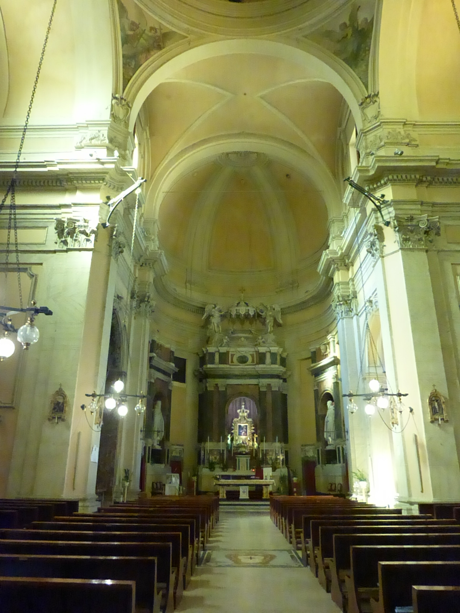 Roma, S. Maria delle Fornaci, interno.